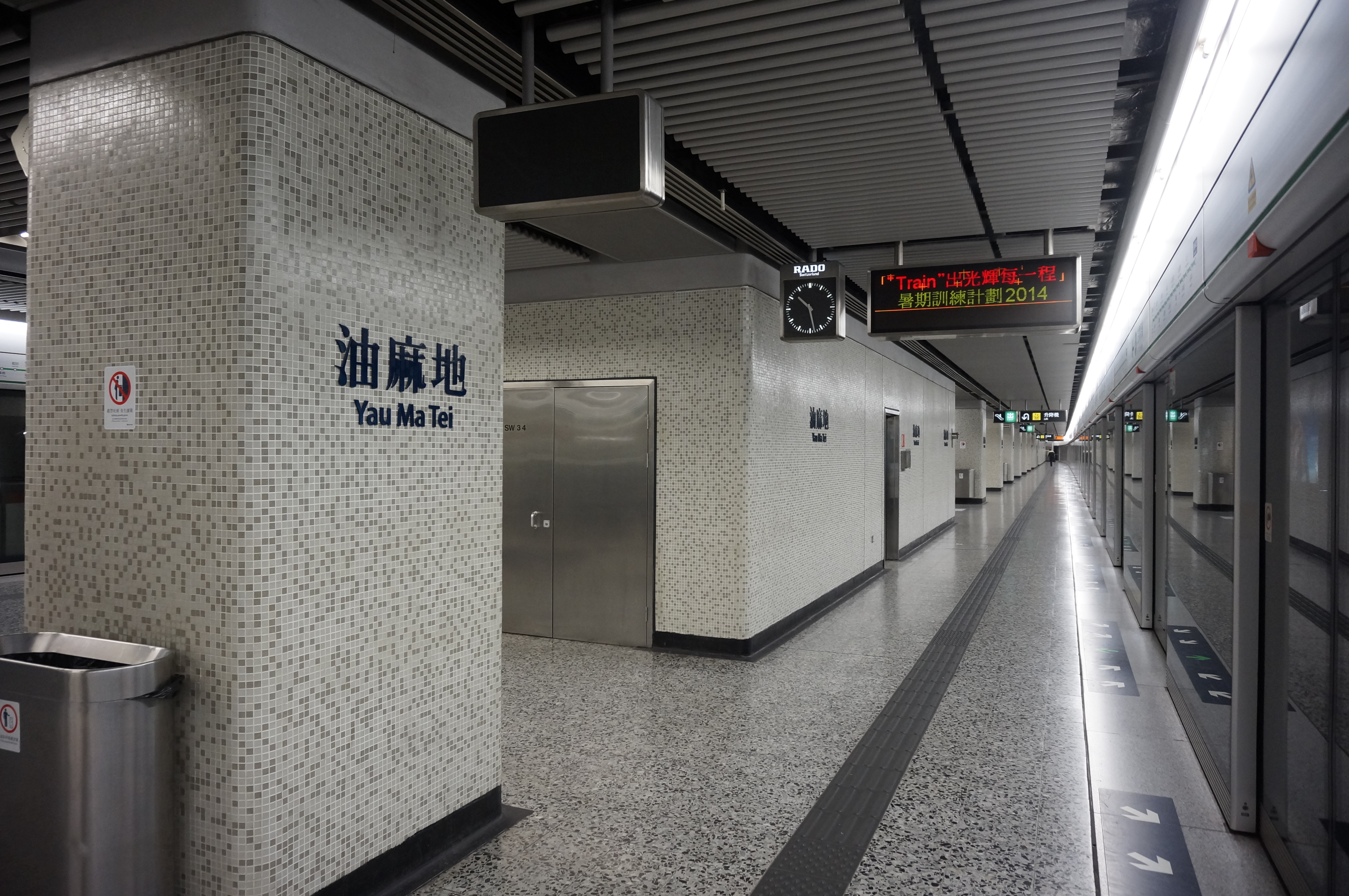 港鐵油麻地站月台